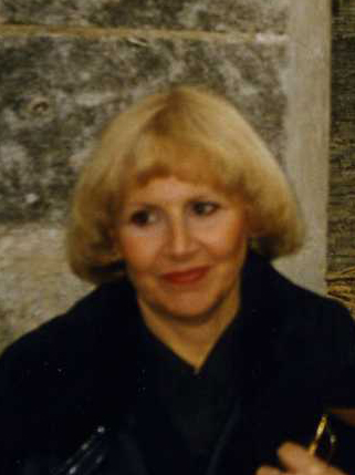 Nicoletta D'Arbitrio